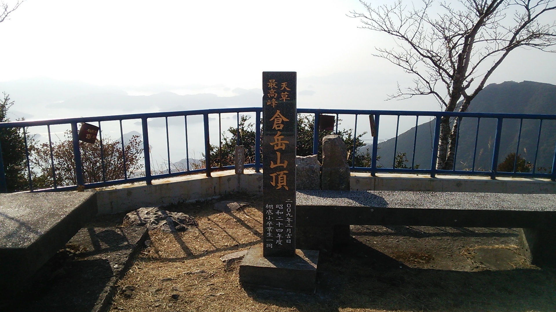 倉岳頂上の展望台